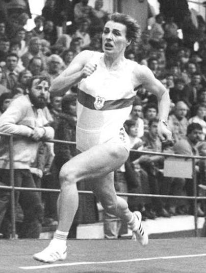 Kirsten Emmelmann ADN-ZB Kluge 16.2.86 Bez. Cottbus: DDR-Hallenmeisterschaften in der Leichtathletik- Marita Koch (SC Empor Rostock- r.) verbesserte über 200 m in Senftenberg ihre eigene Weltbestmarke um sechs Hundertstelsekunden auf 22,33 s. Die alte Bestzeit hatte sie vor drei Jahren in Budapest aufgestellt. Links Kirsten Emmelmann (SC Magdeburg), die Zweite wurde.